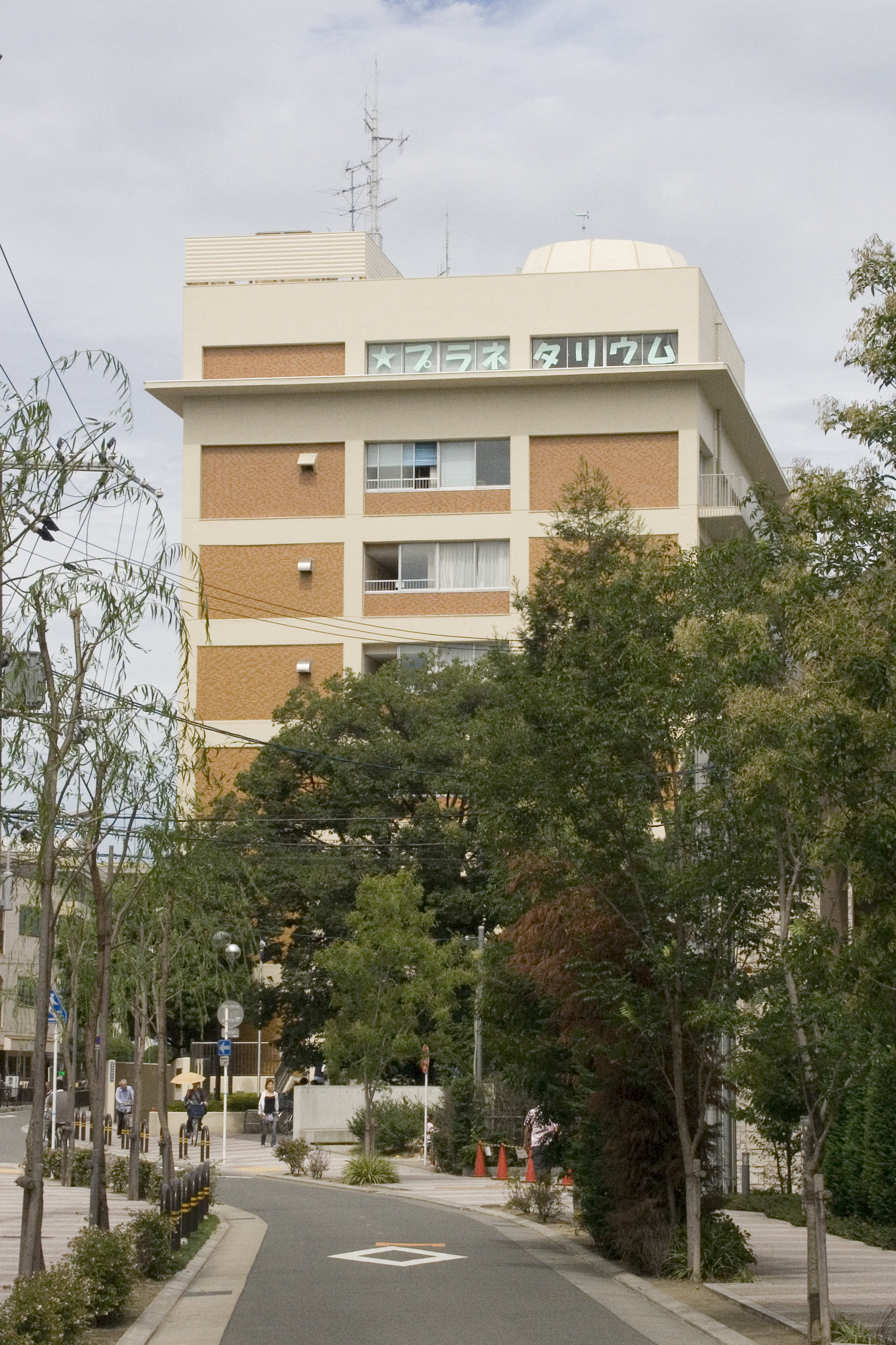 茨木市立中央公民館天文観覧室